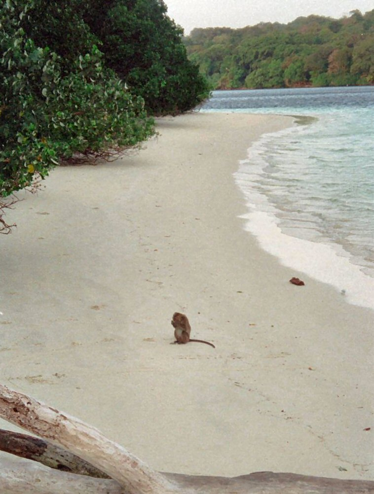 Pulau Peucang - Eigen werk aug 1999